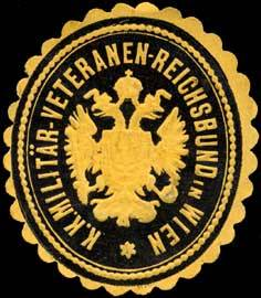 Sealing stamp Title: K.K. Militär-Veteranen-Reichsbund in Wien Description: gelb, schwarz, geprägt Place: Wien size: 4x4 cm